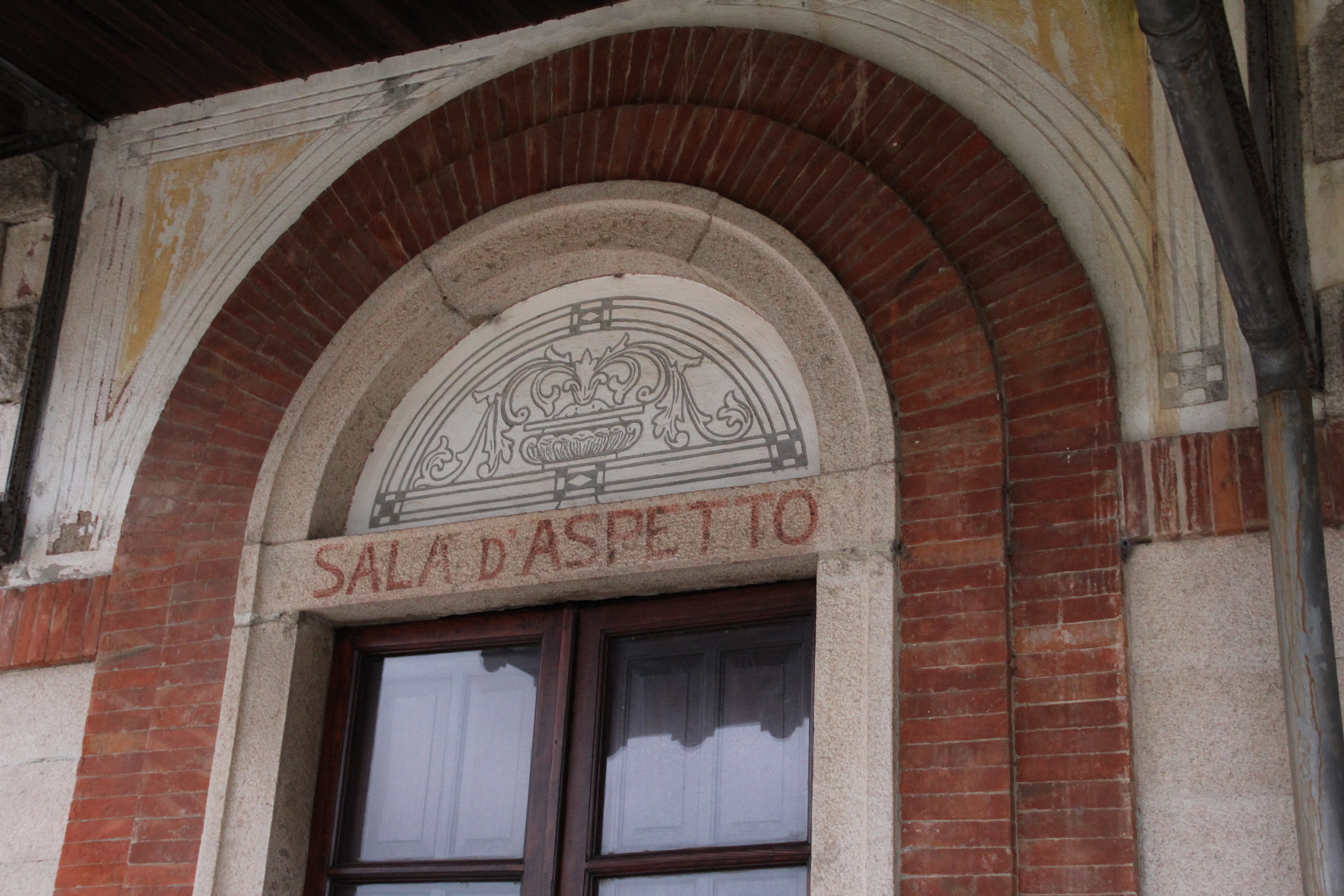 Tempio Pausania - Stazione ferroviaria